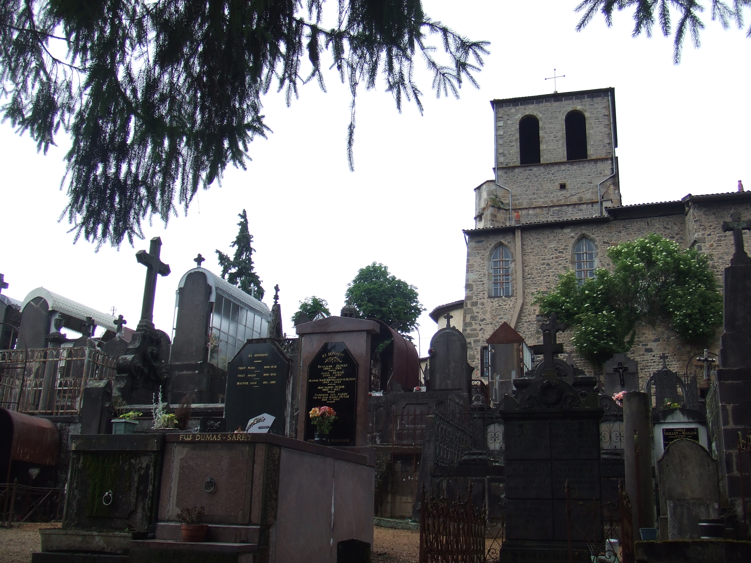 église saint-jean à thiers